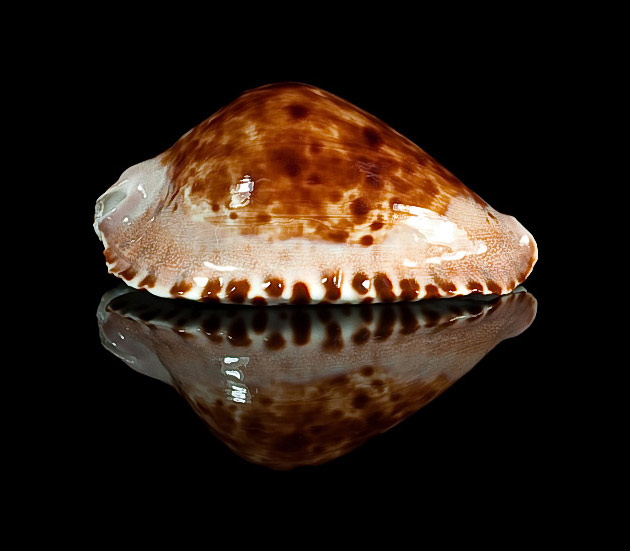 Gehäuse aus der Gattung Zoila der Familie der Kaurischnecken (Cypraeidae)